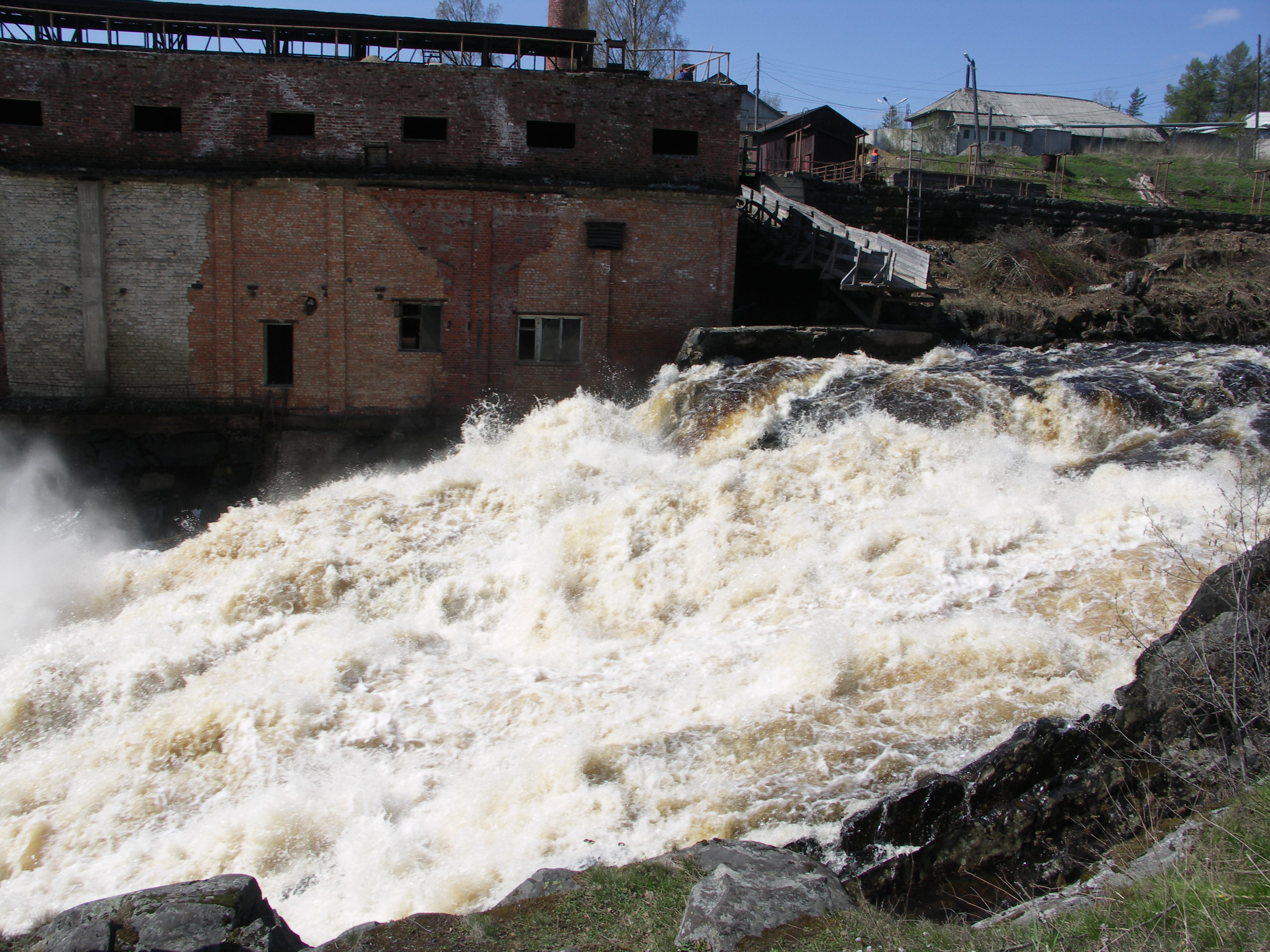 Янисйоки